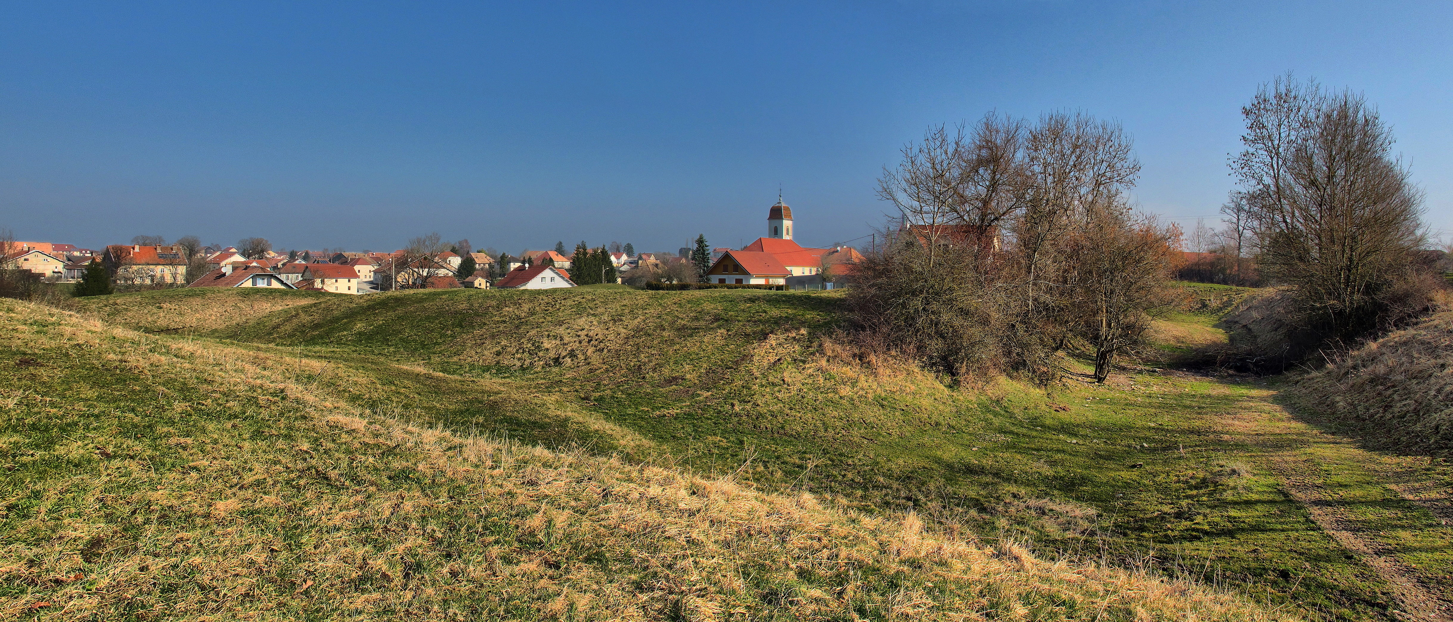 vestiges du château des Archevêques, Etalans, Doubs, France